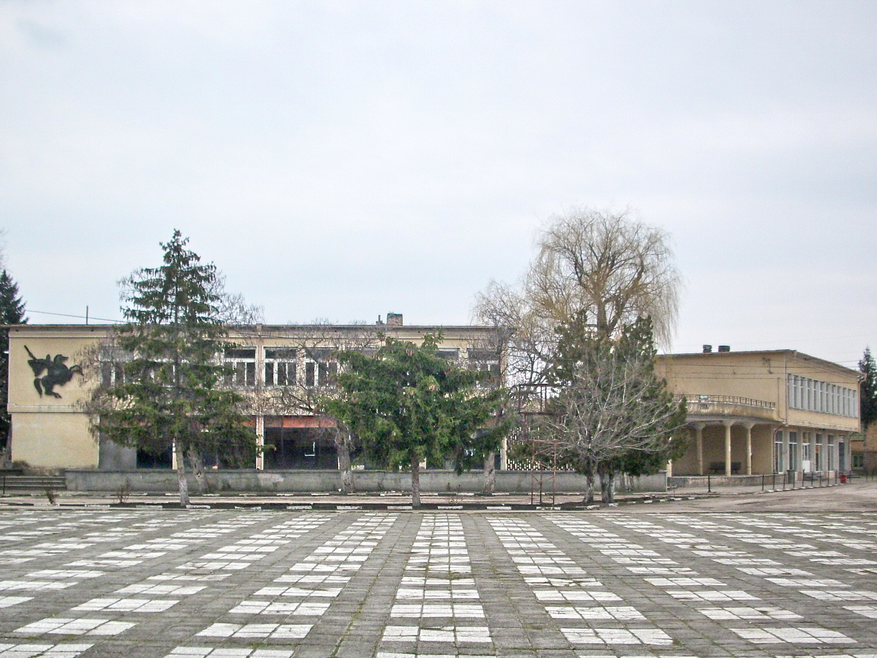 Село Кардам, община Попово. Селският площад с основните сгради